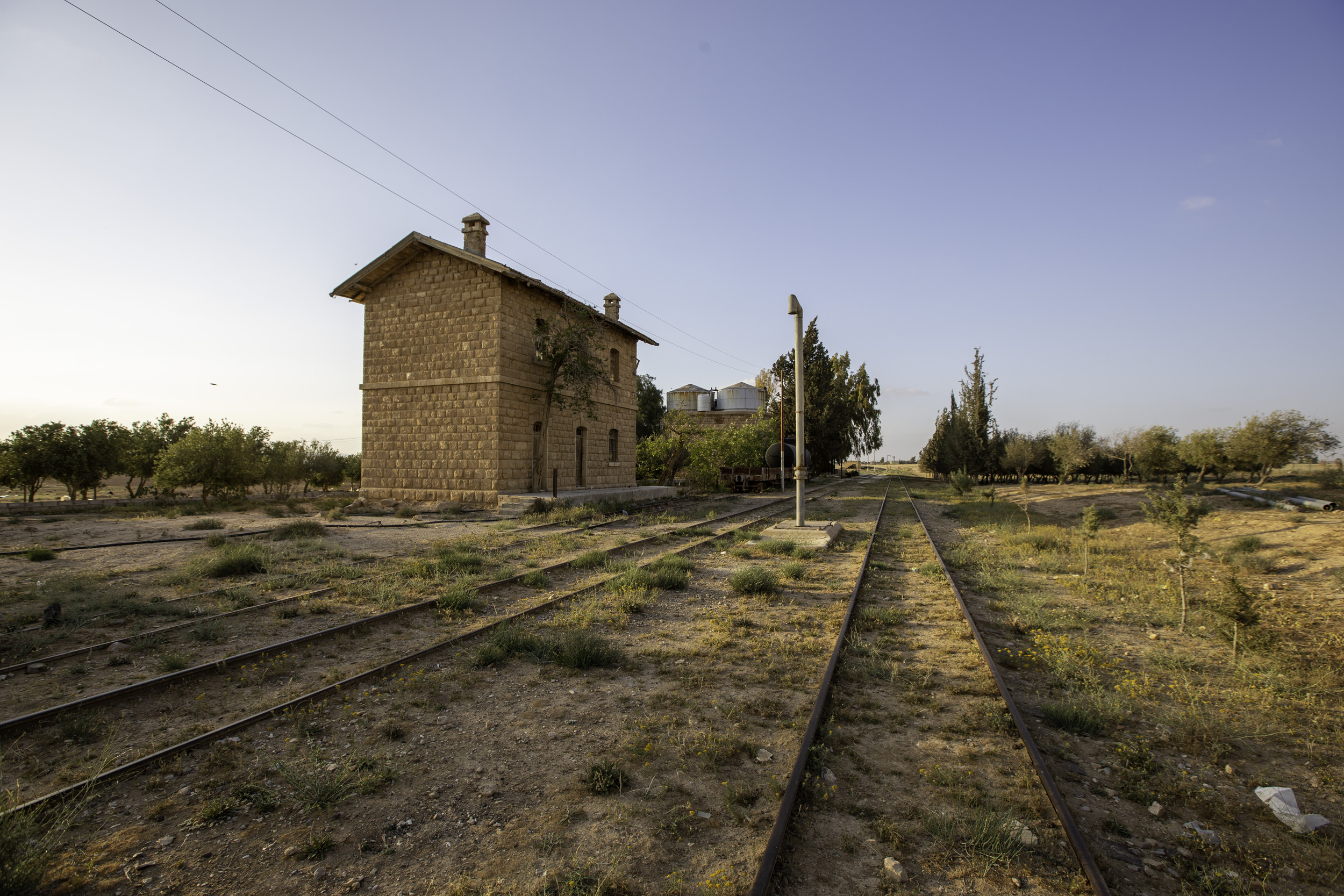 صورة لمحطة سكة حديد الحجاز التاريخية في الجيزة ، جنوب عمان ، الأردن Jiza Hejaz Railway Station